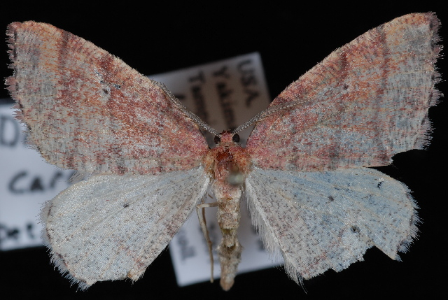 Drepanulatrix falcataria